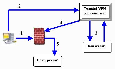 Authentizace přes VPN